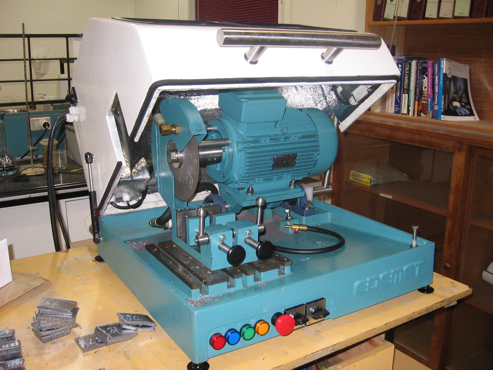 Fotografía de la cortadora de muestras metalográficas de un laboratorio del Departamento de Ingeniería Metalúrgica, de la Facultad de Ingeniería, de la Universidad de Concepción, Chile